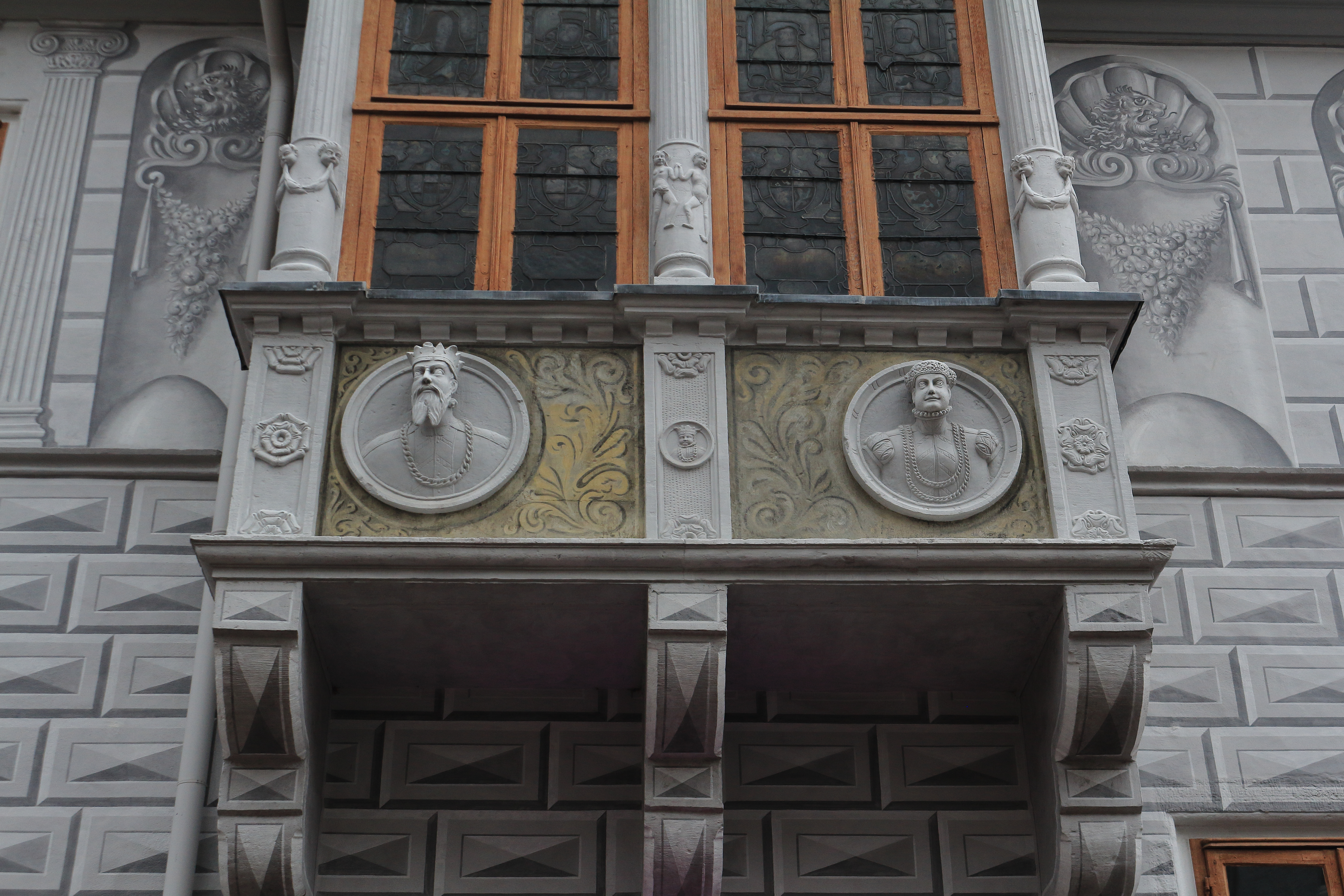 Detail im Erker an der Frontseite des Alten Rathauses in Celle, Herzog Wilhelm der Jüngere (Braunschweig-Lüneburg) (1535-1592) und Herzogin Dorothea von Dänemark (1546–1617)